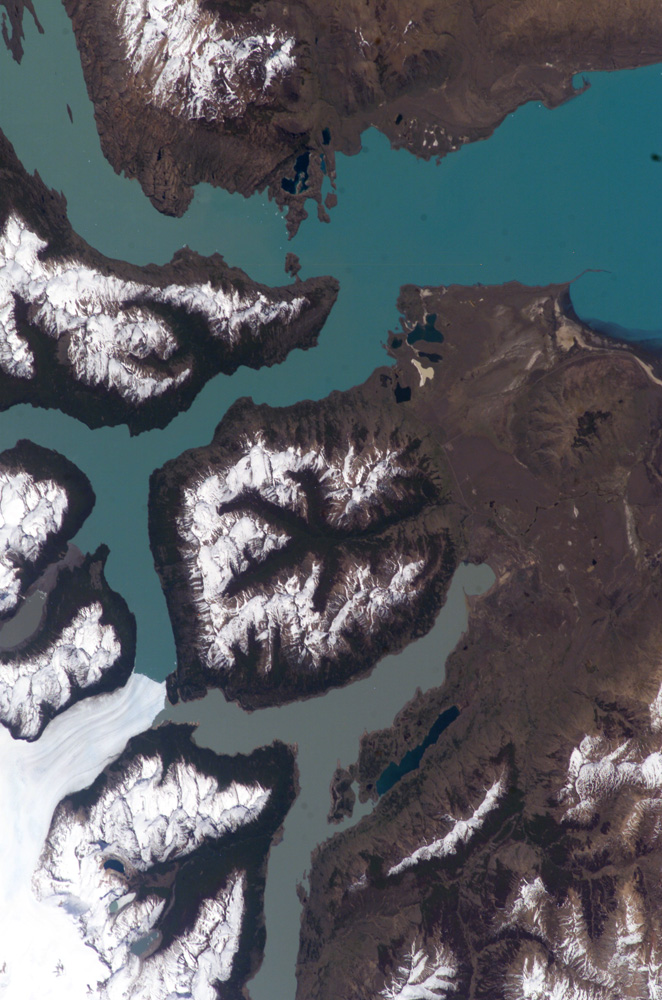 Perito Moreno kosmosest